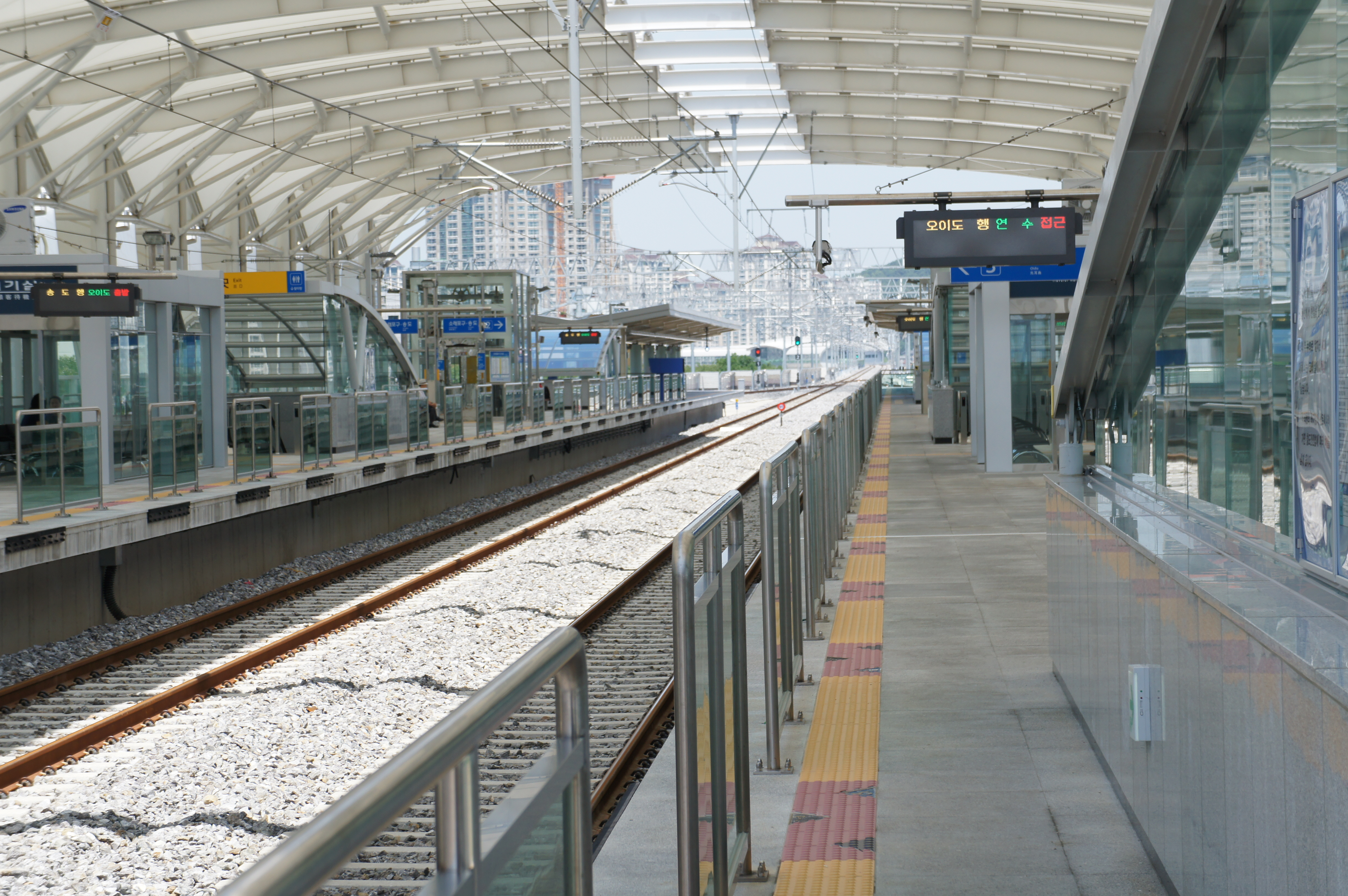 월곶역 승강장